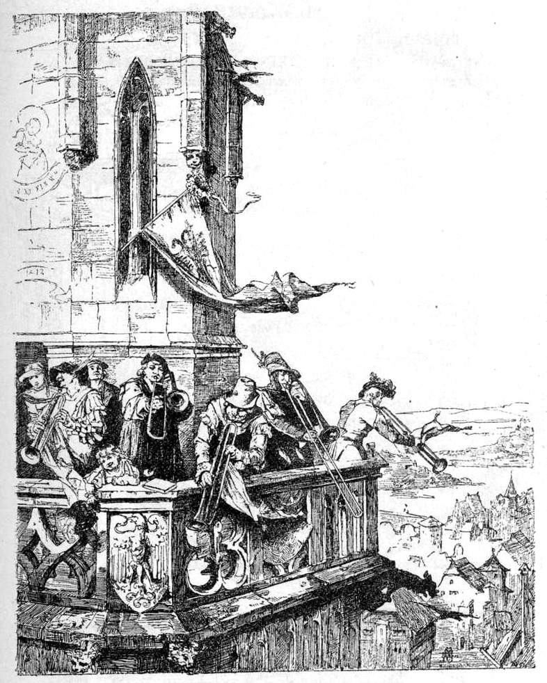 Thurmbläser